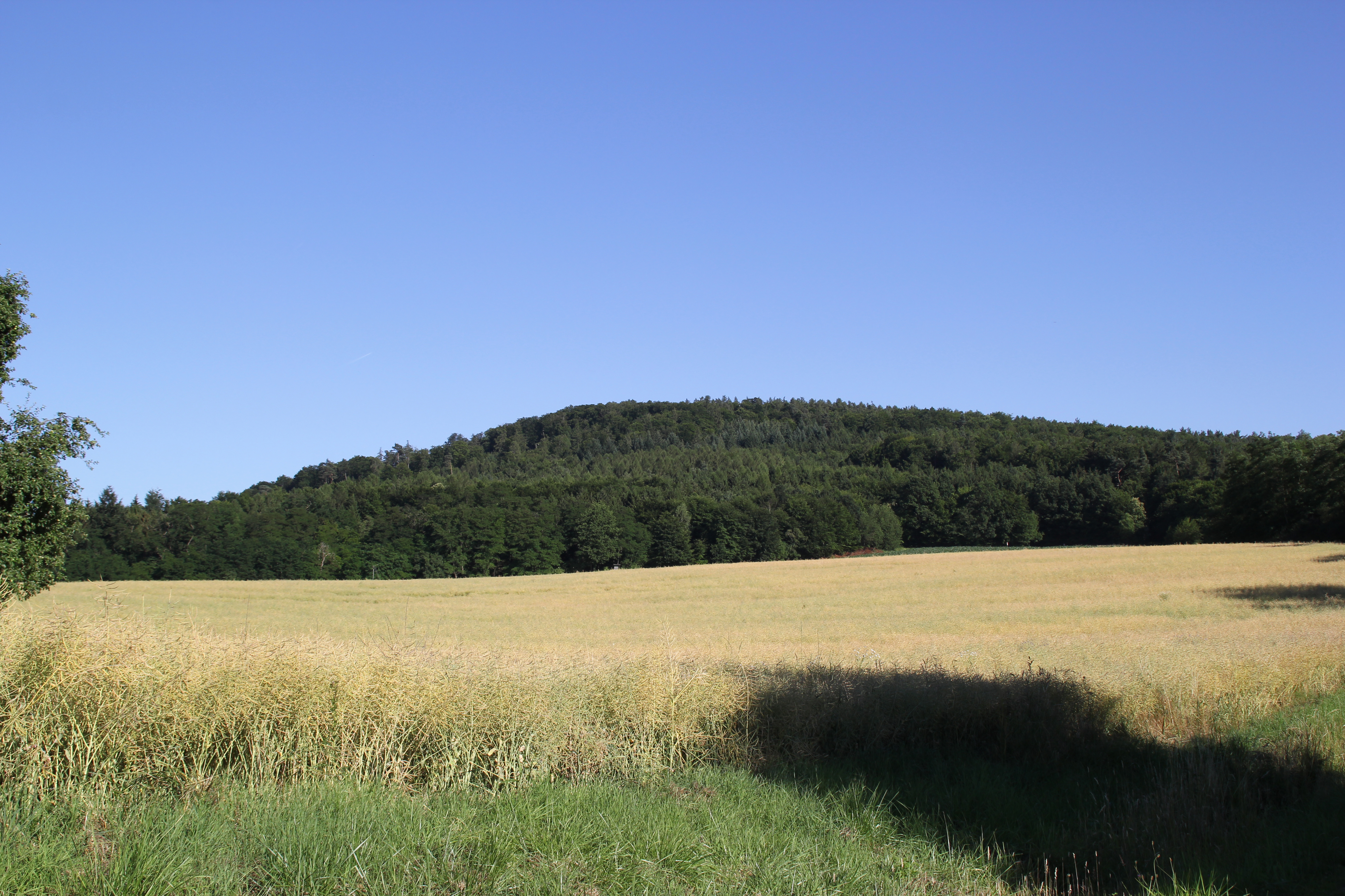 Der Schanzenkopf am Hahnenkamm bei Alzenau in Bayern